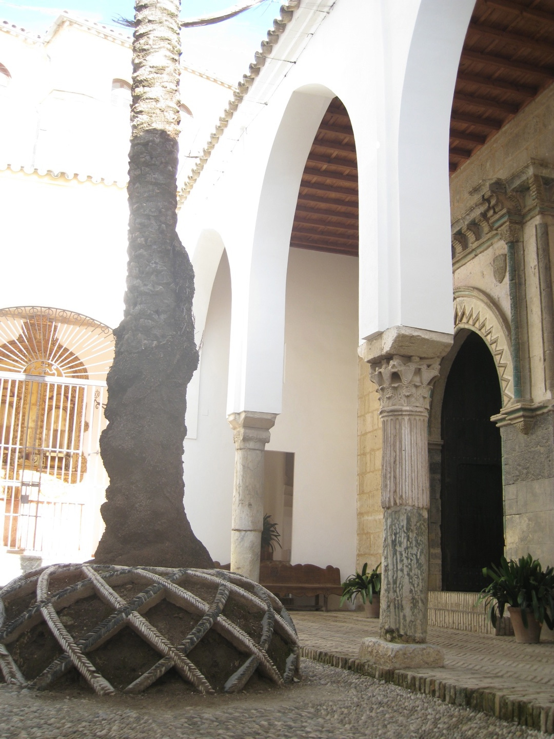 Exterior de la capilla de San Bartolomé, Córdoba (España).